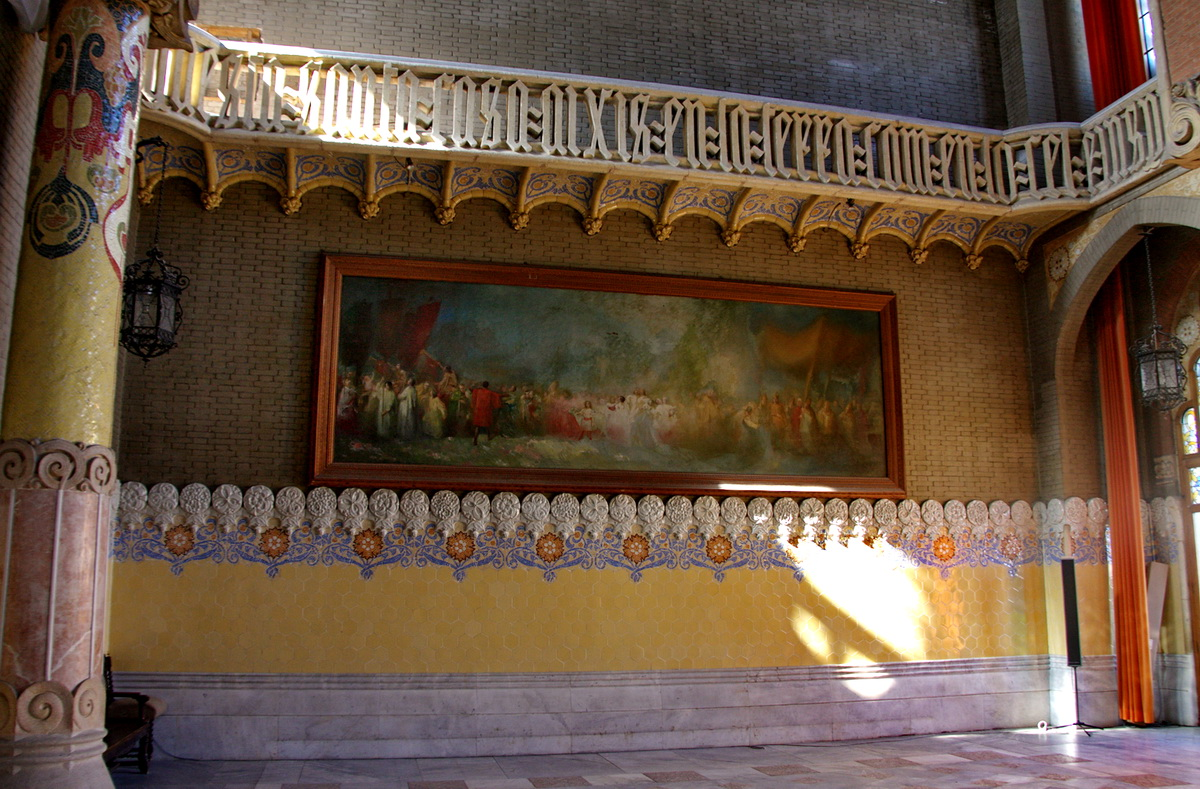 Saló d'Actes (presidencia) a l'Hospital de Sant Pau (Barcelona, Catalunya) (1905-1913)